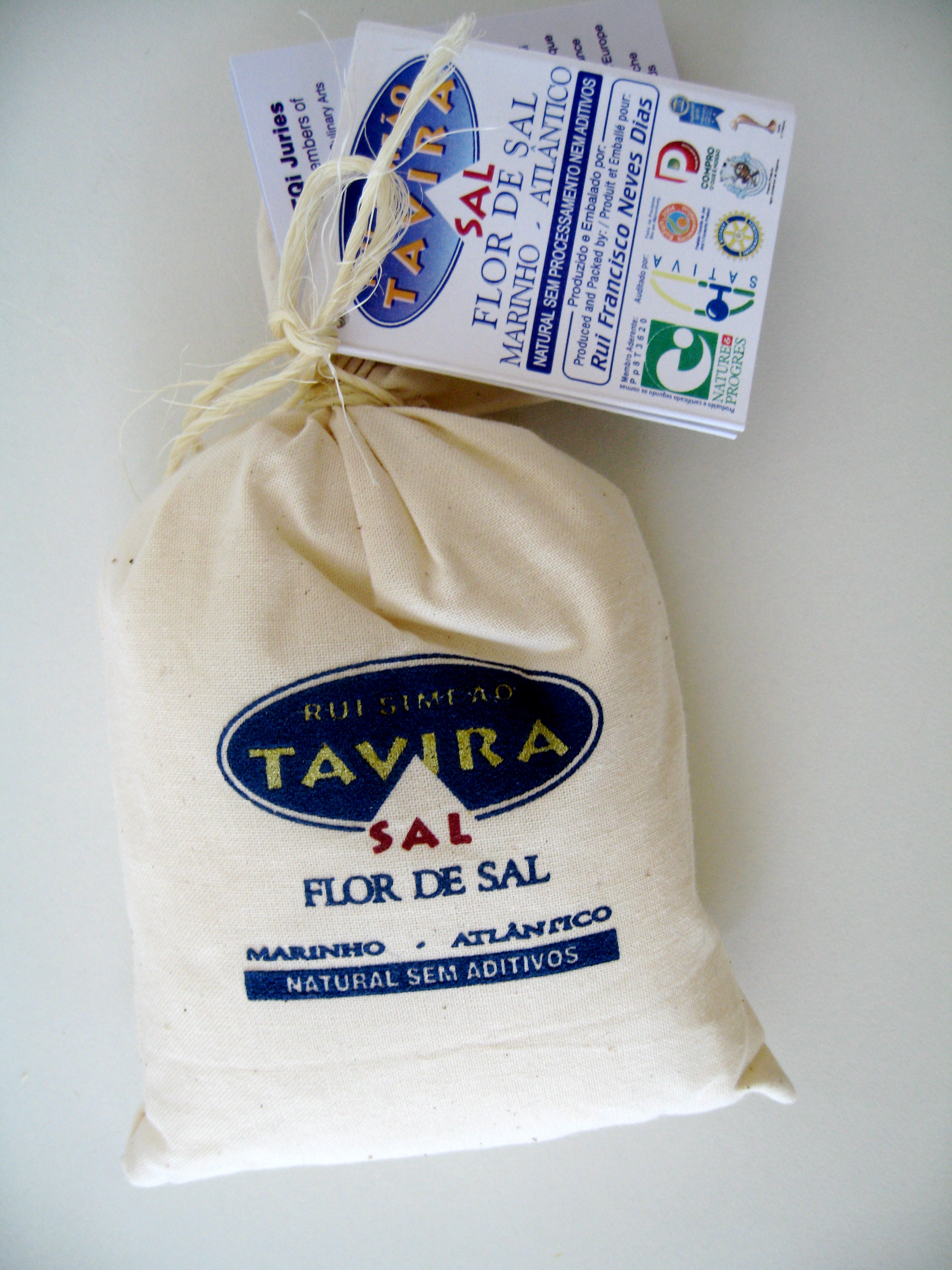 Flor de sal do Algarve.